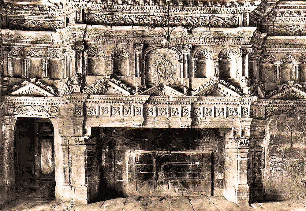 Gordes cheminée Renaissance 1541